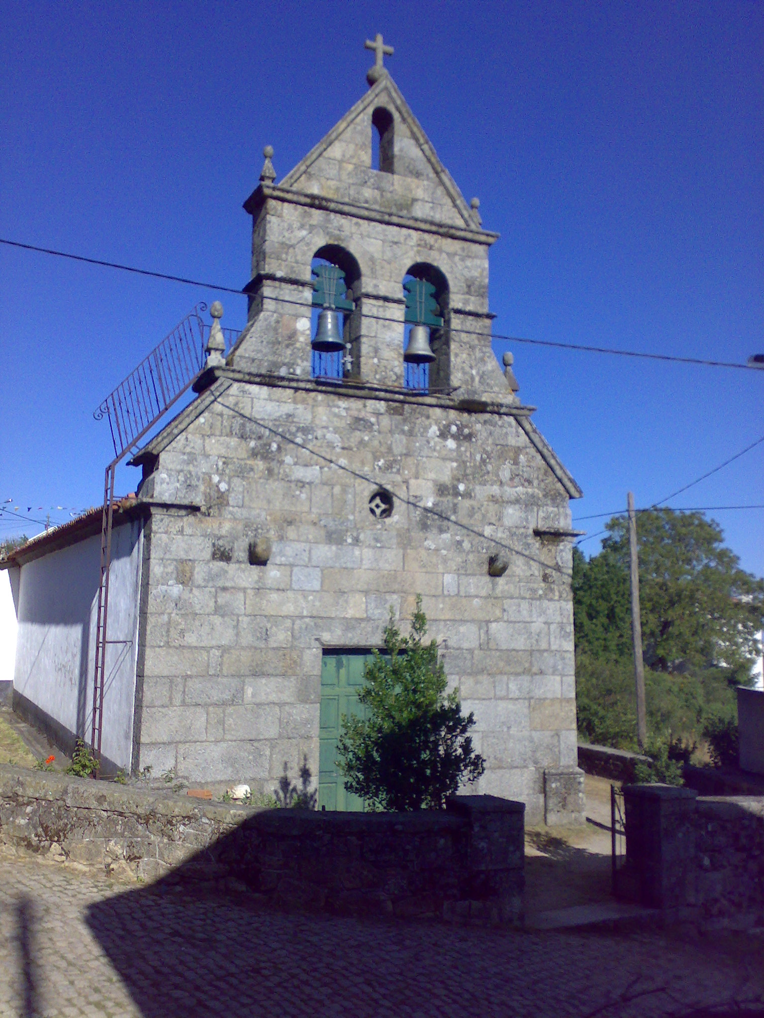 Igreja de Rebordainhos